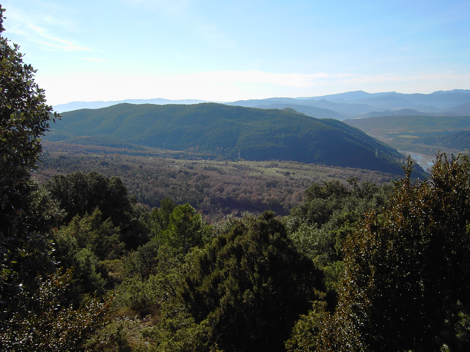 La Sierra de Arro, en el municipio oscense de El Pueyo de Araguás